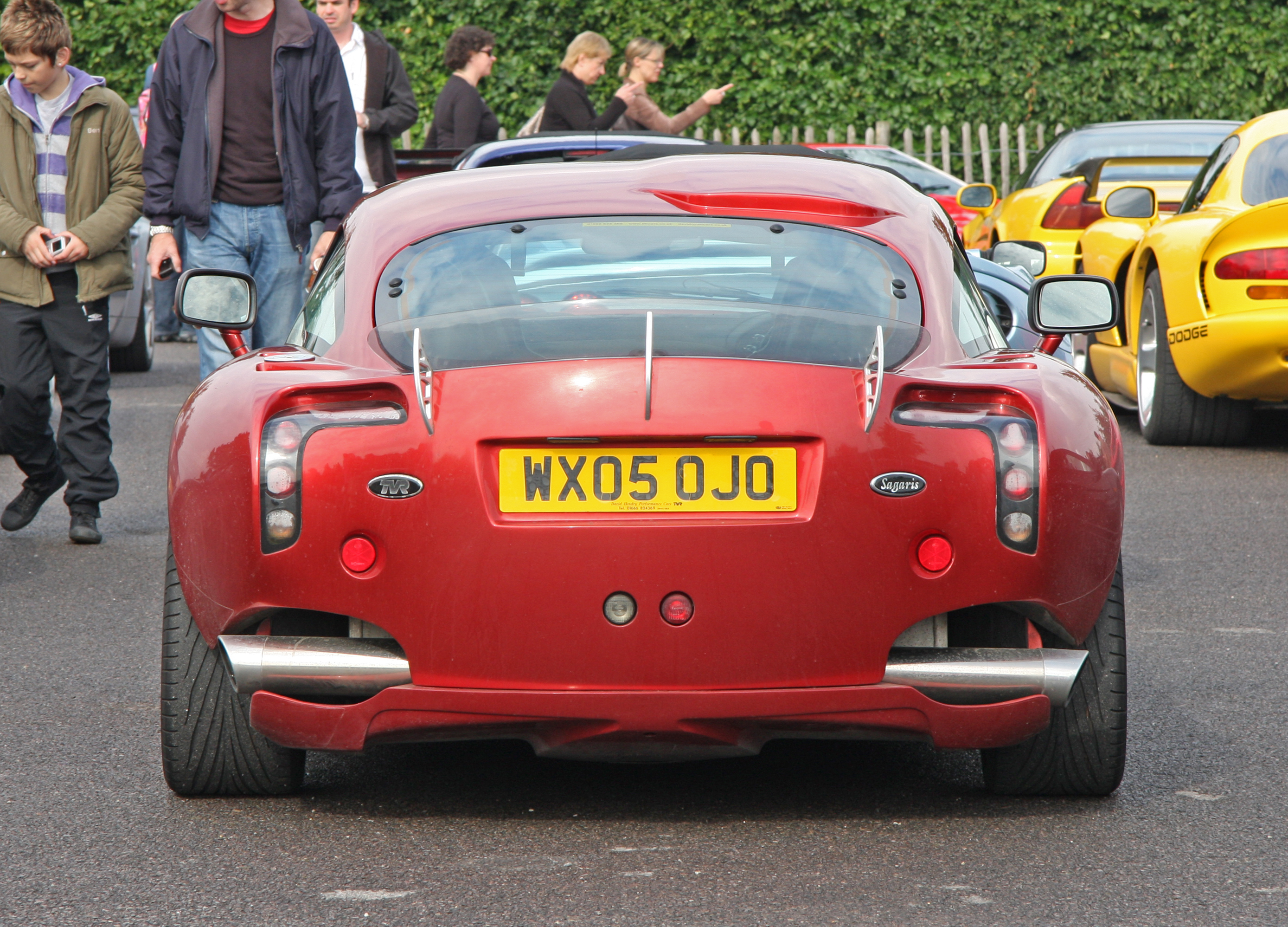 TVR Sagaris